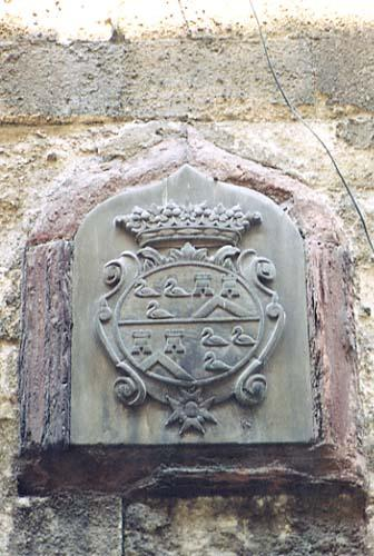 Armes de la famille des saint priest sur l'ancien consulat français à istanbul. aux 1 et 4, d'argent, à trois merlettes de sable (Guignard); aux 2 et 3, d'azur, au chevron d'argent, acc. en chef de deux tours d'or, maçonnées de sable